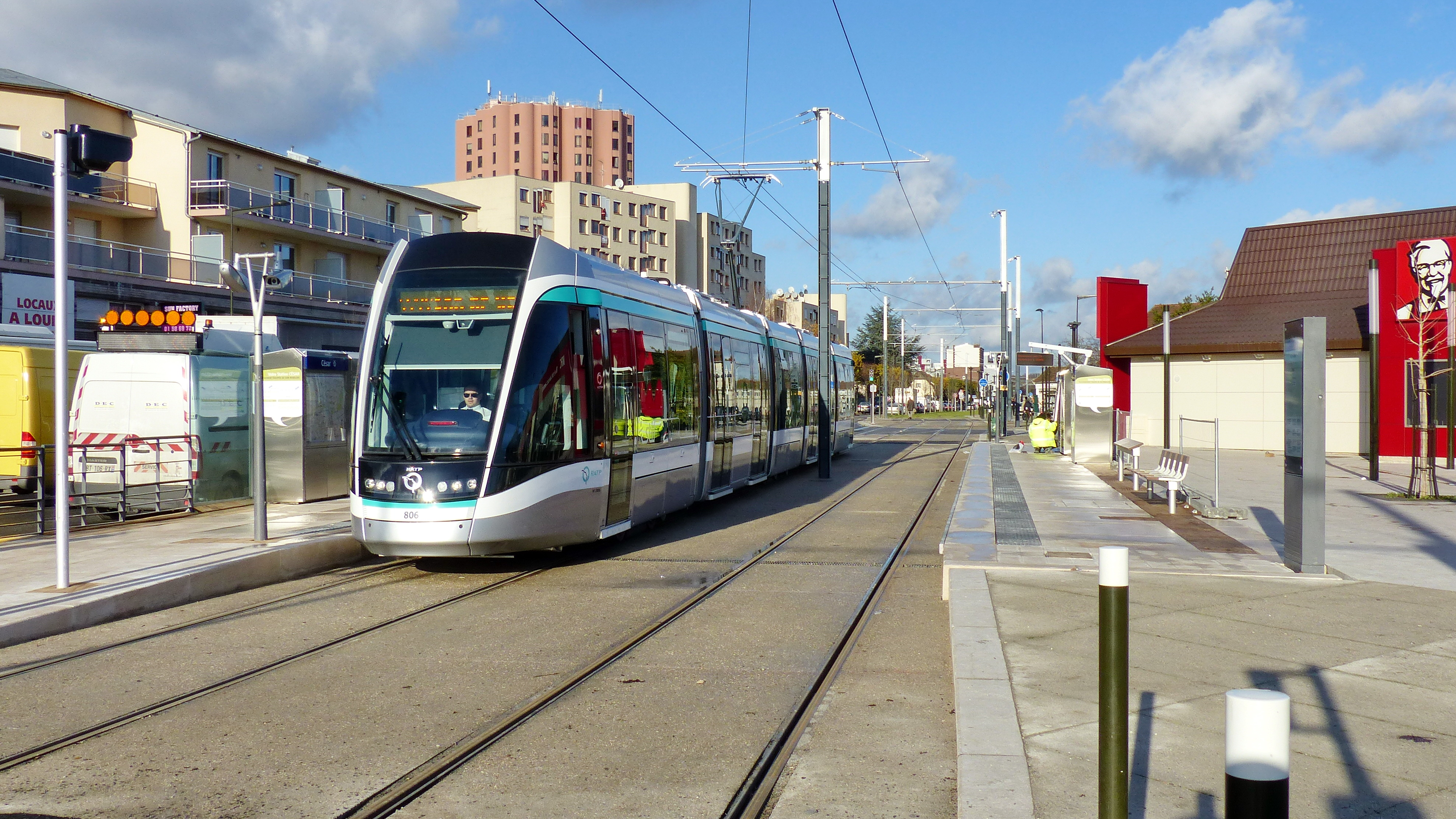 Station César du tramway T8 à Villetaneuse, jouxtant le centre commercial BienVenu